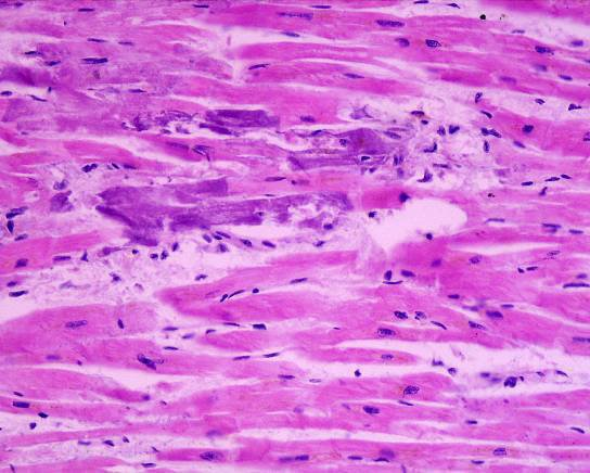 Necrosis dispersa microfocalis myocardii